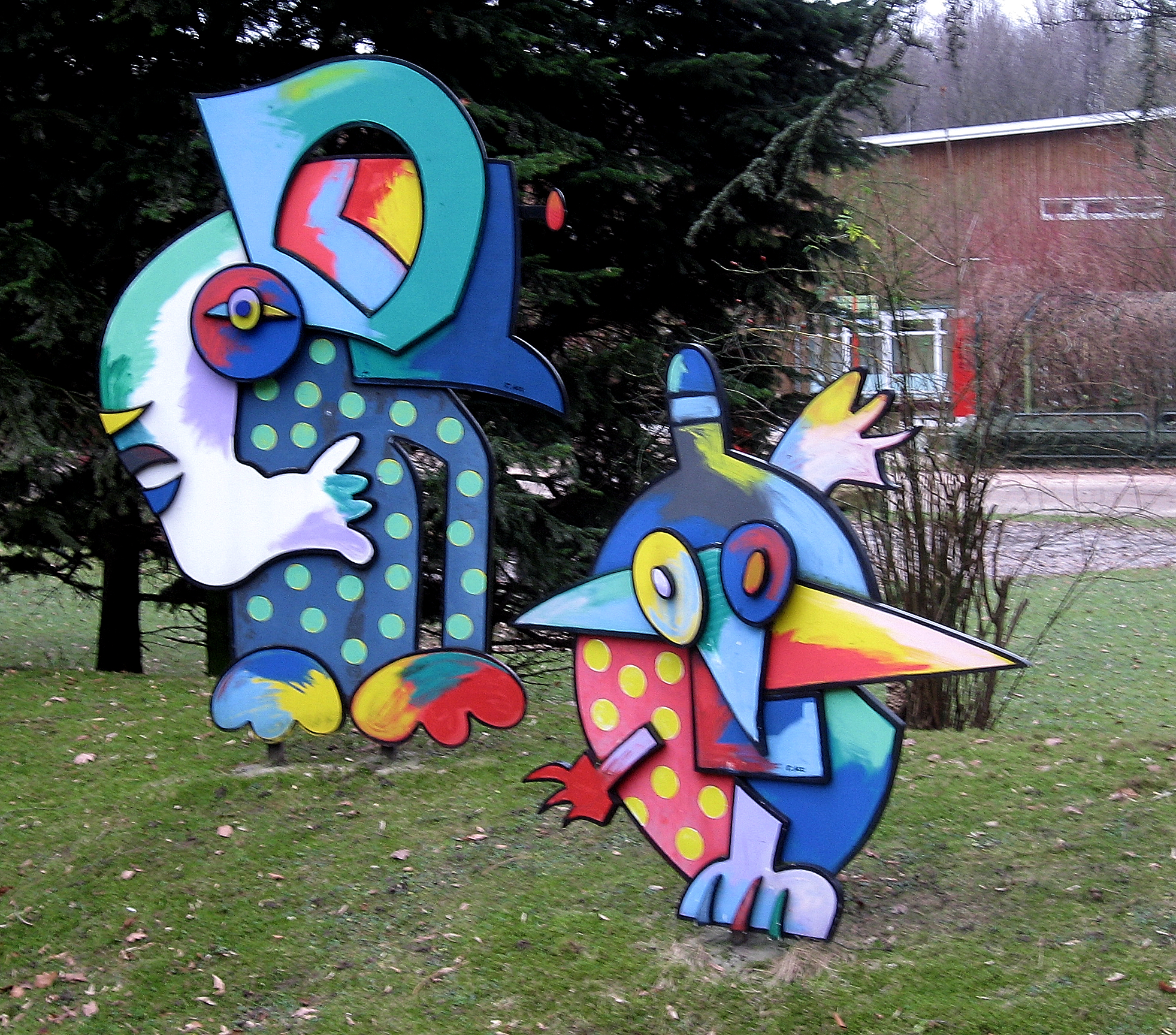 Otmar Alt, 10 Tierskulpturen im Zoo Münster, entstanden im Rahmen der Ausstellung “Animalia 85”, einer Präsentation von Tierplastiken des 20. Jahrhunderts im Allwetterzoo Münster, die Plastiken wurden 1991 von Alt überarbeitet